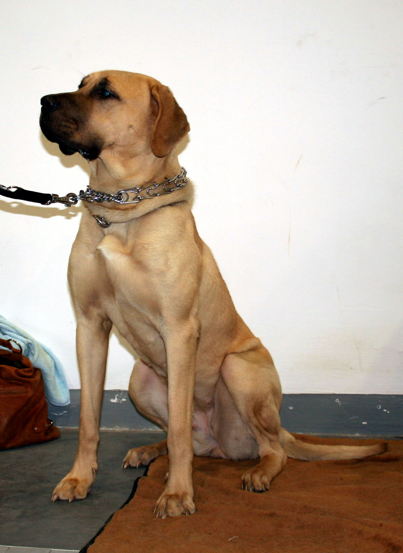 Tosa_inu na Światowej Wystawie Psów Rasowych w Poznaniu